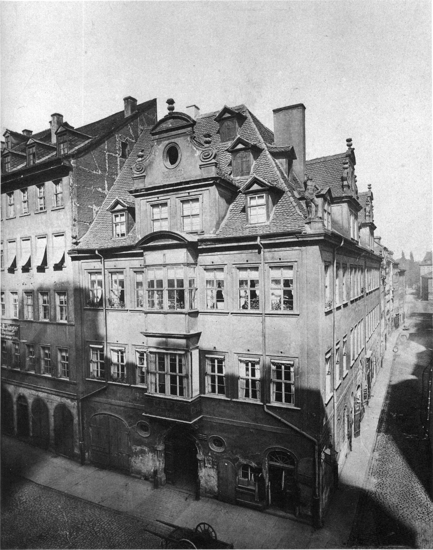 Der "Goldene Apfel" am Brühl Nr. 21, 1880 In der Dachecke männliche Plastik, zum Himmel deutend G. R. Jünger Buchbinder Café Gesswein